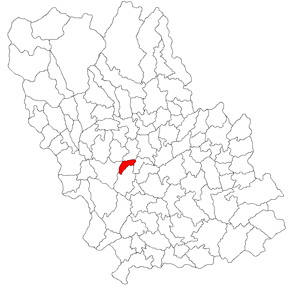 Categorie:Hărţi ale judeţului Prahova